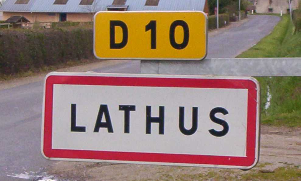 Panneau d'entrée de la ville de Lathus-Saint-Rémy